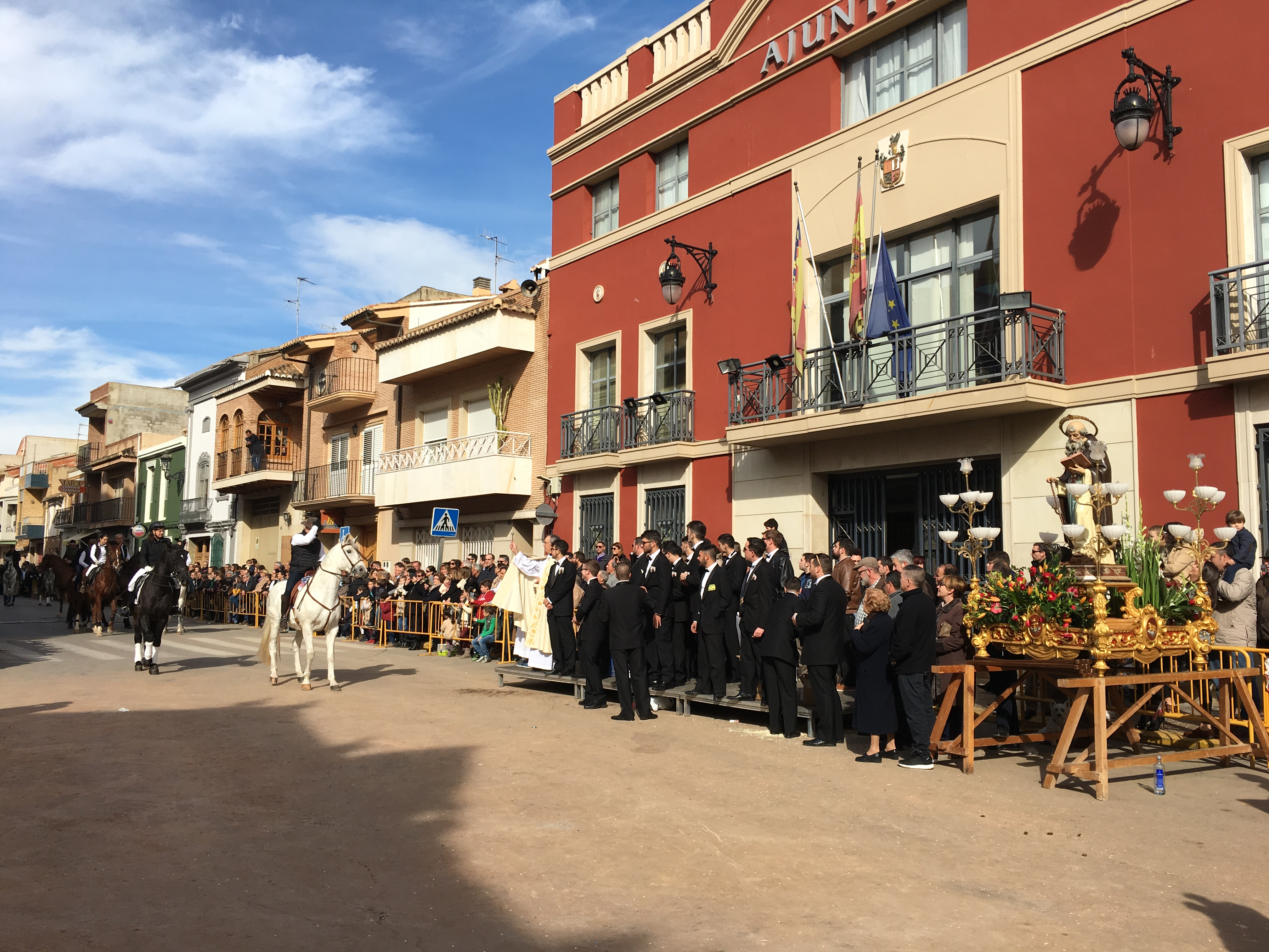 Bendición de los animales en la Plaza de la Purísima